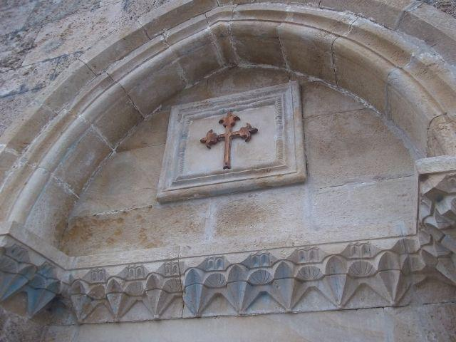 Fragment wyremontowanej świątyni w Nidż, Azerbejdżan